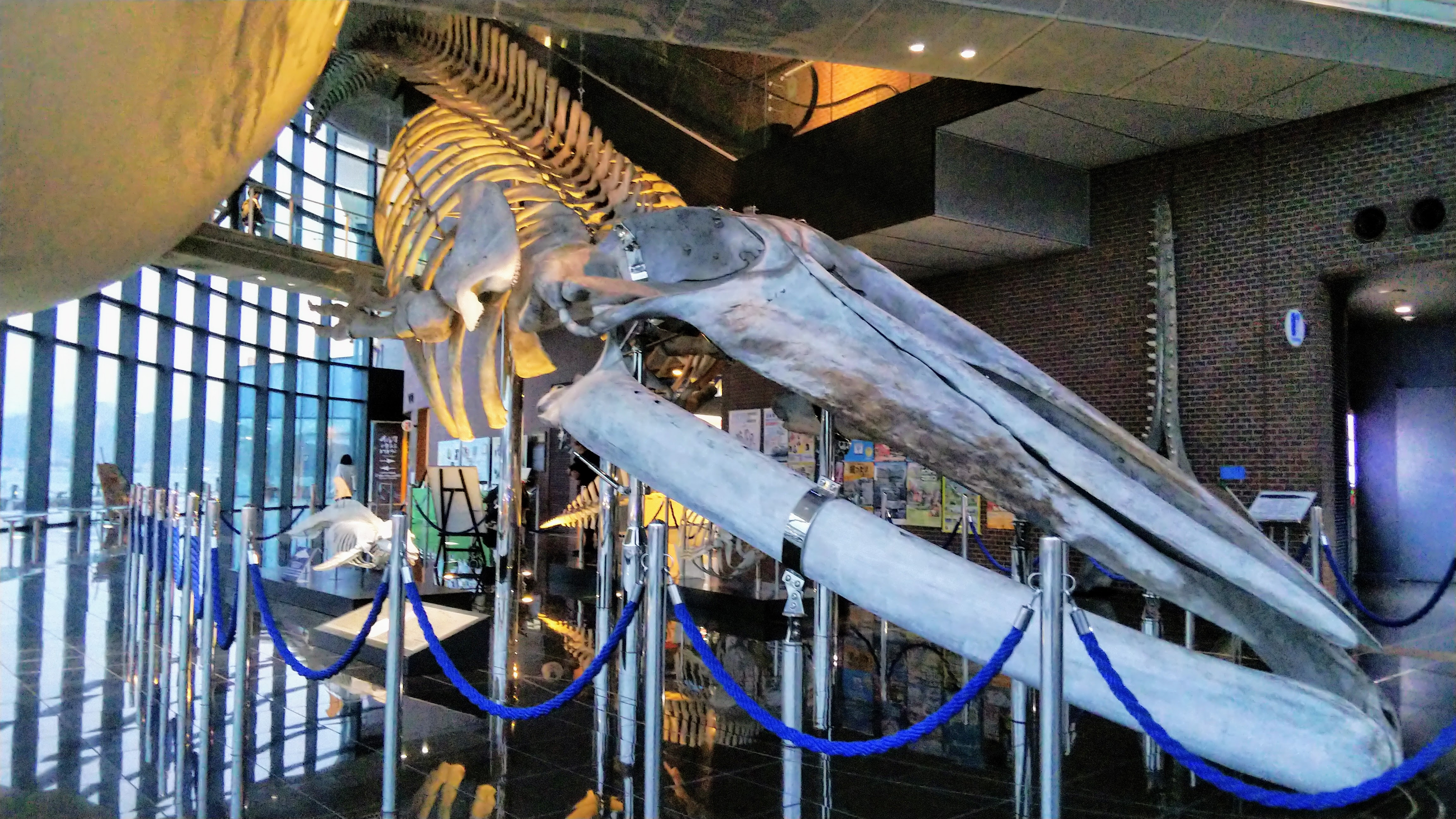 日本では唯一となるシロナガスクジラの全身骨格標本（全長23メートル）。山口県下関市の「海響館」（下関市立しものせき水族館）にて撮影。手前の骨格標本はハンドウイルカのもの。